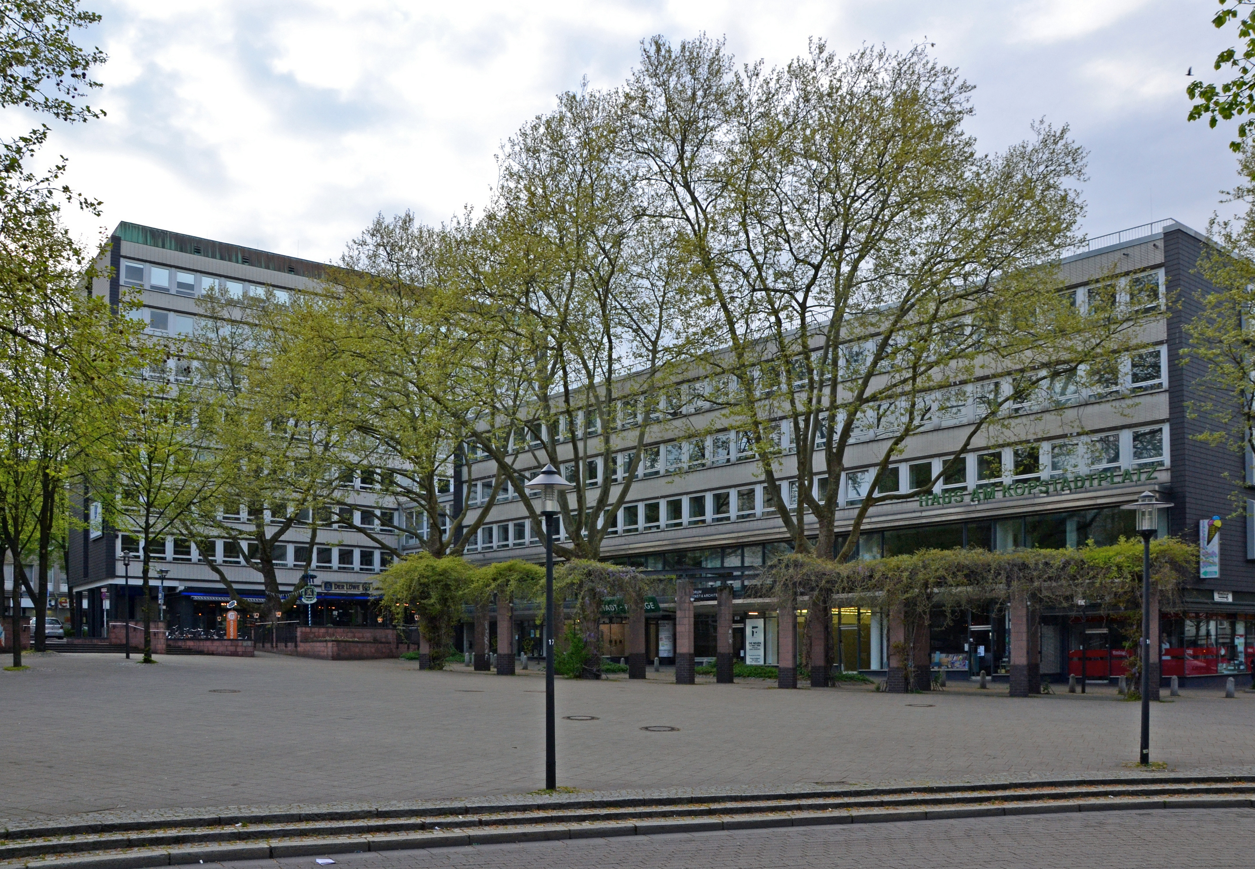 "Haus am Kopstadtplatz" im Essener Stadtkern, nach einem Entwurf des Düsseldorfer Architekten Willy Holtgreve